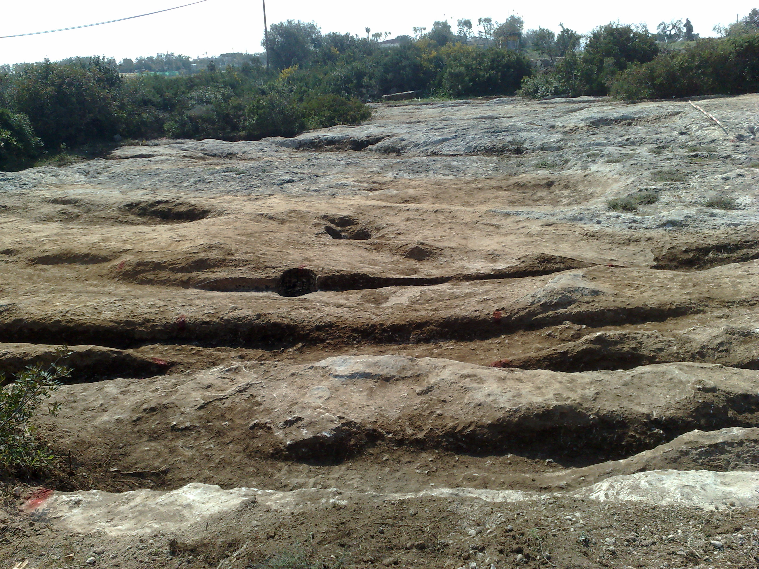 Solchi carrai della via Traiana in località Monopoli (BA) Italy